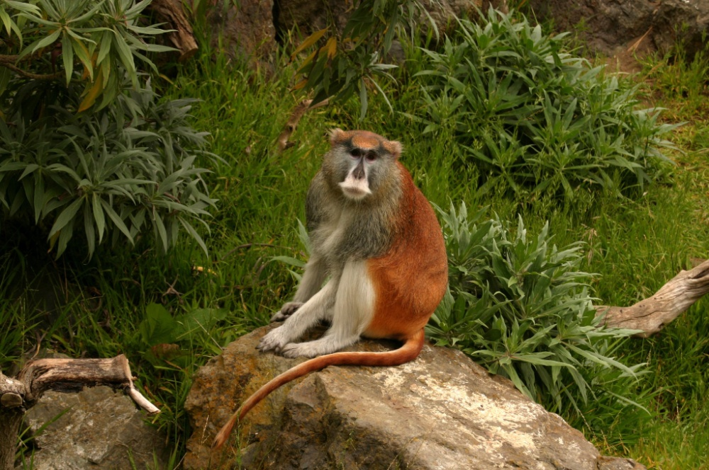 Патас (Erythrocebus patas).